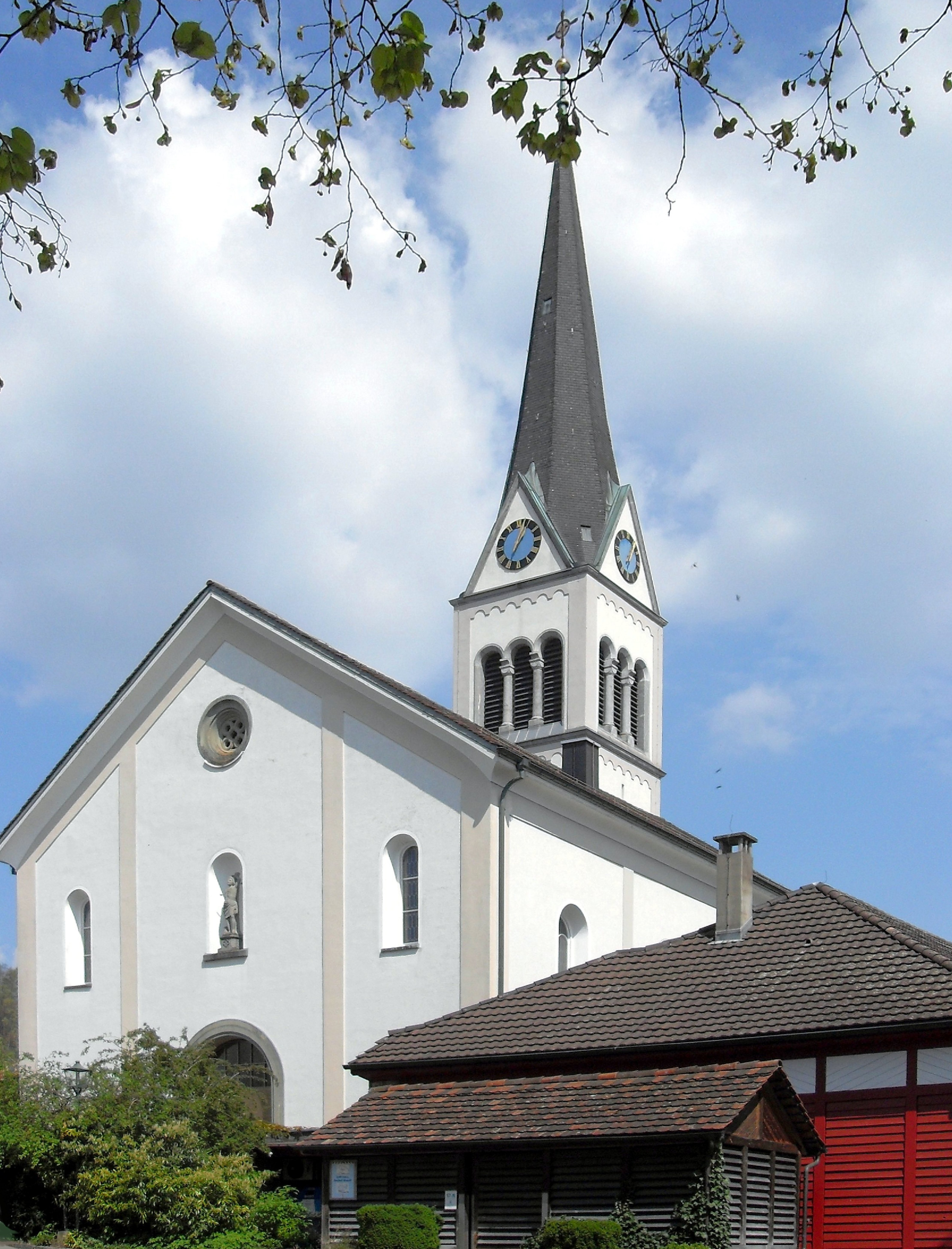 katholische Kirche St. Sebastian in Herdern, Kanton Thurgau, Schweiz